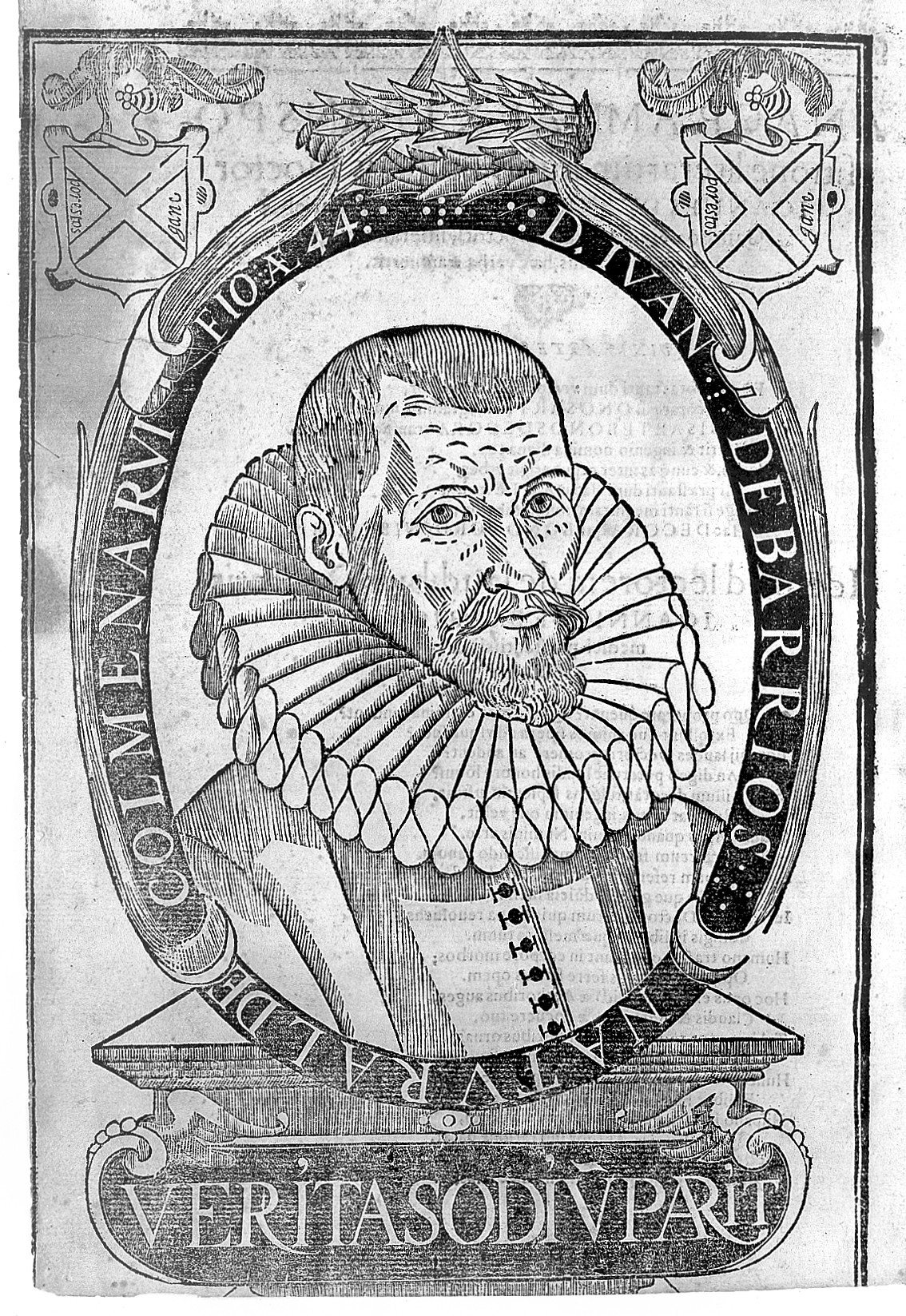 Retrato de Juan de Barrios Rare Books Keywords: Juan de Barrios